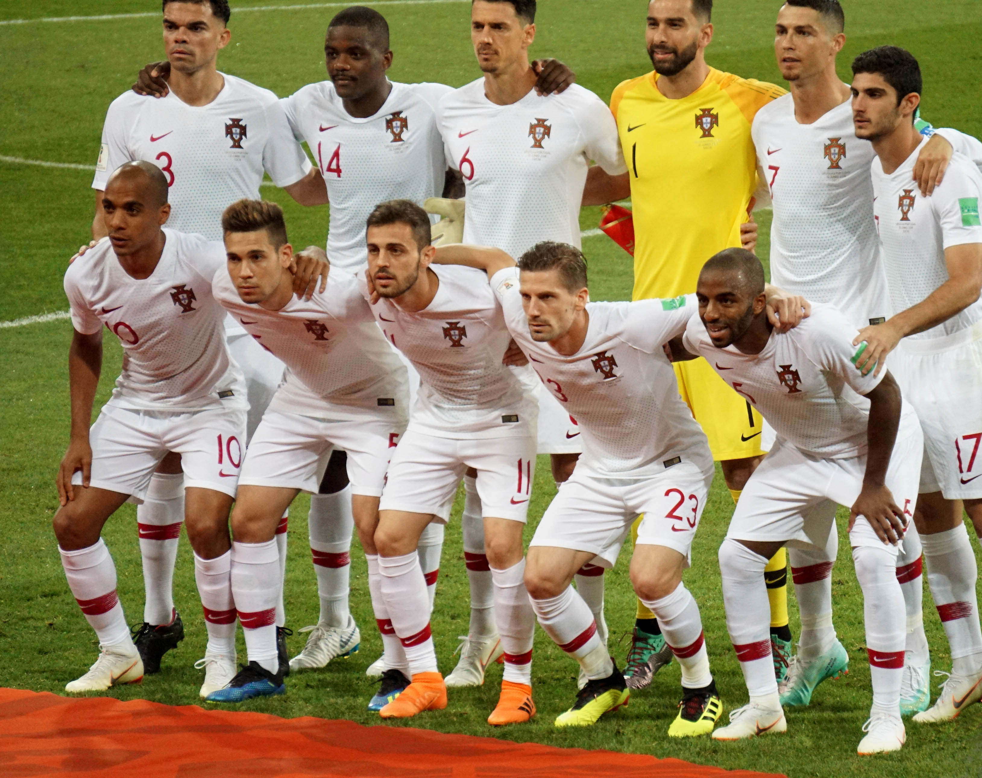 Сборная Португалии по футболу — команда, представляющая Португалию на ЧМ 2018. Сочи, Фишт. Португалия - Уругвай, 1/8.